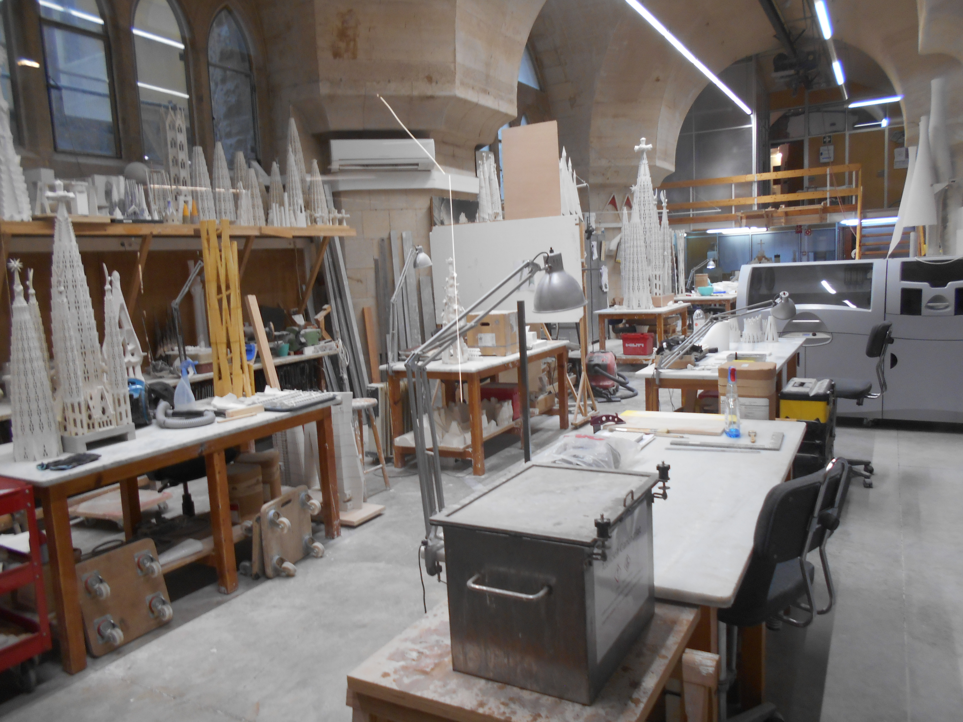 Taller de maquetistas.